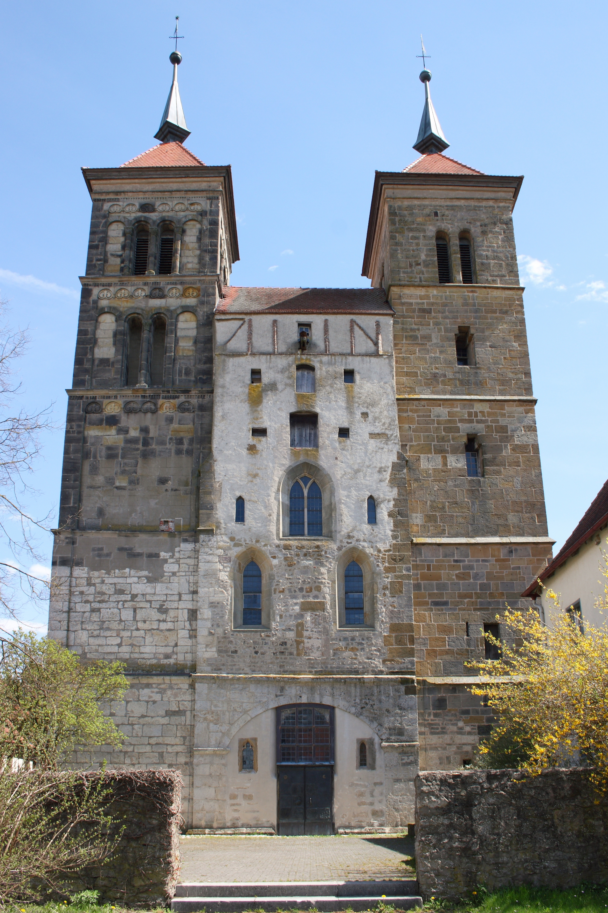 Evangelische Pfarrkirche, ehemalige Benediktinerklosterkirche St. Maria in Auhausen im Landkreis Donau-Ries (Bayern), Westfassade